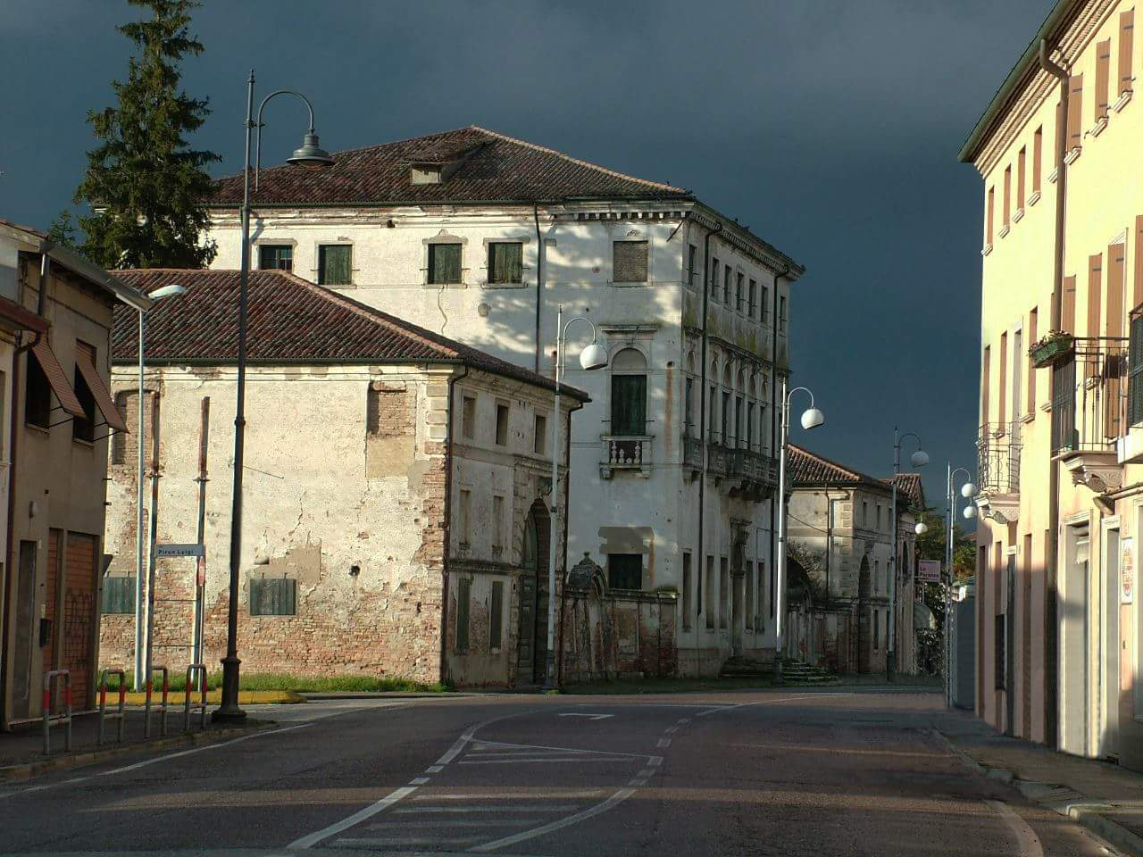 vista dello stabile provenendo da Arzerello